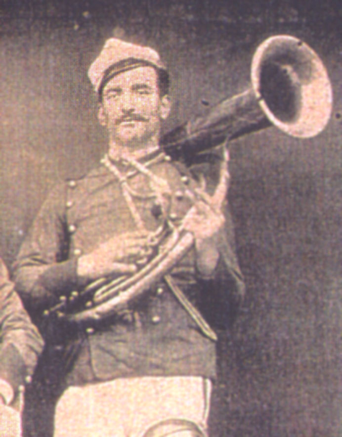 Alberto Sartori, filho de Salvador Sartori e Angela Zancaner.